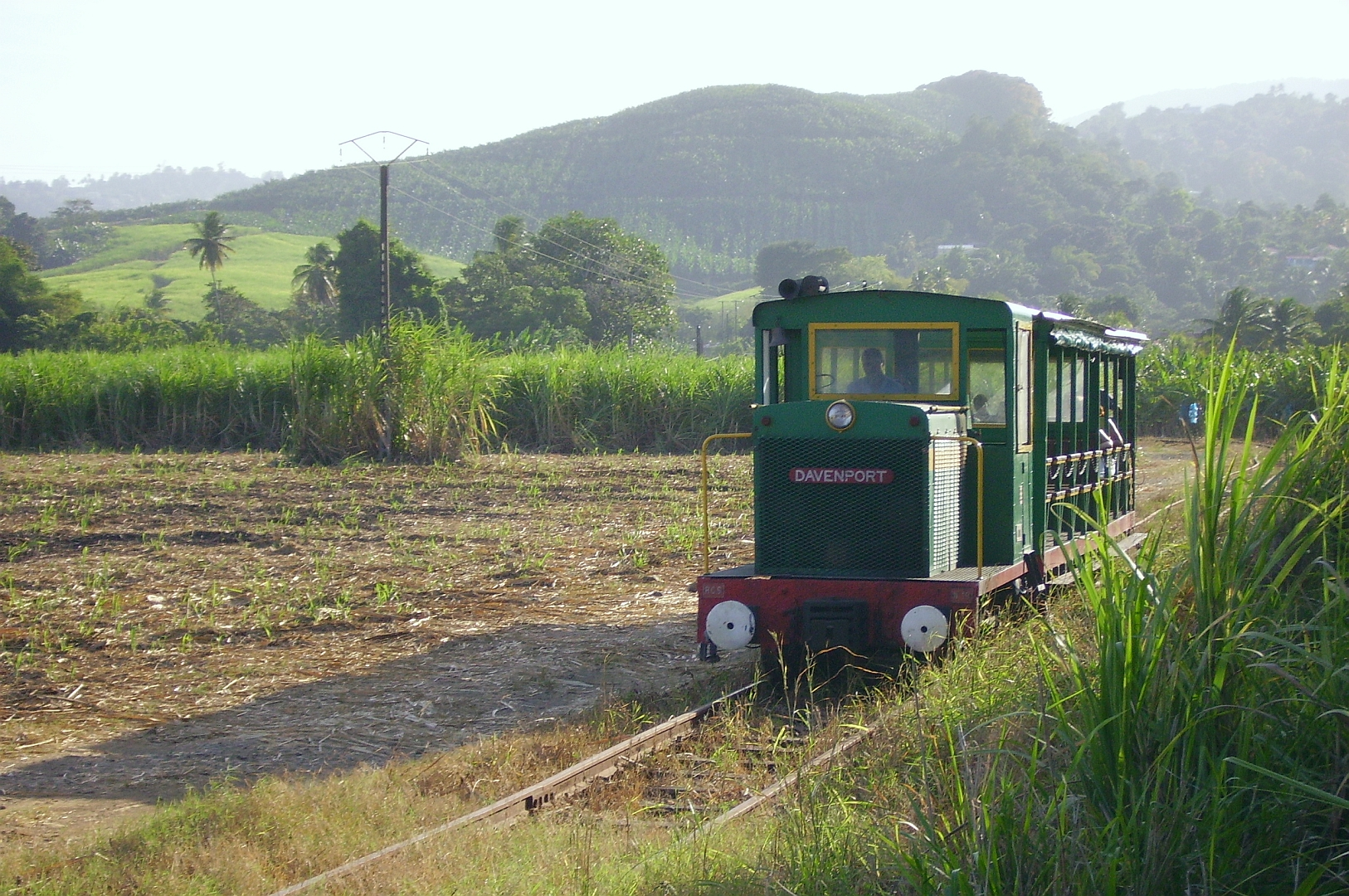 Le train des plantations à Sainte-Marie sur l'île de la Martinique le 06/03/2010.